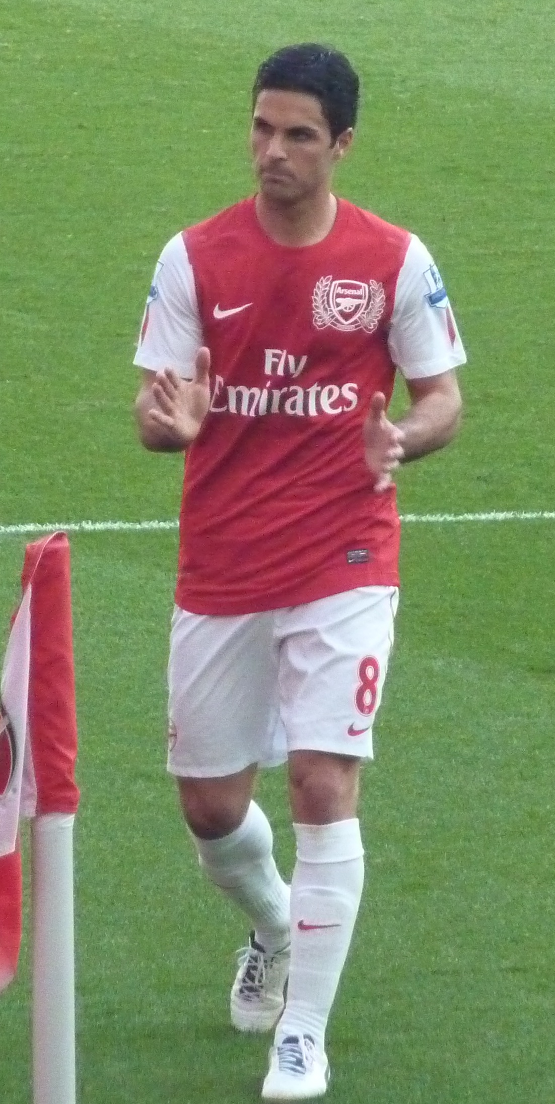 Артета готовиться к угловому.